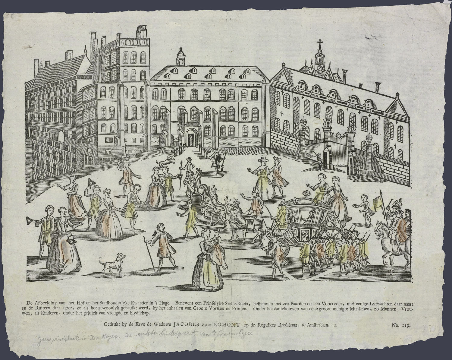 Centsprent met een grote niet omkaderde houtsnede met een afbeelding van een plein en gebouwen er omheen, met een prinselijke statie-koets met paarden, lijfwachten en ruiters, en een aantal toeschouwers. De prent toont de buitenkant van het Binnenhofcomplex: links het weerspiegelende water van de Hofvijver, dan de zijkant van de gebouwen die op de Hofvijver uitkijken en daarnaast de ingang naar de Binnenhof. Over de daken is het torentje van de Ridderzaal zichtbaar.